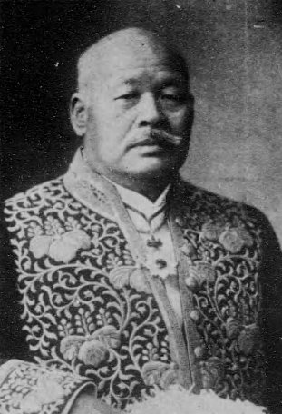 野田卯太郎